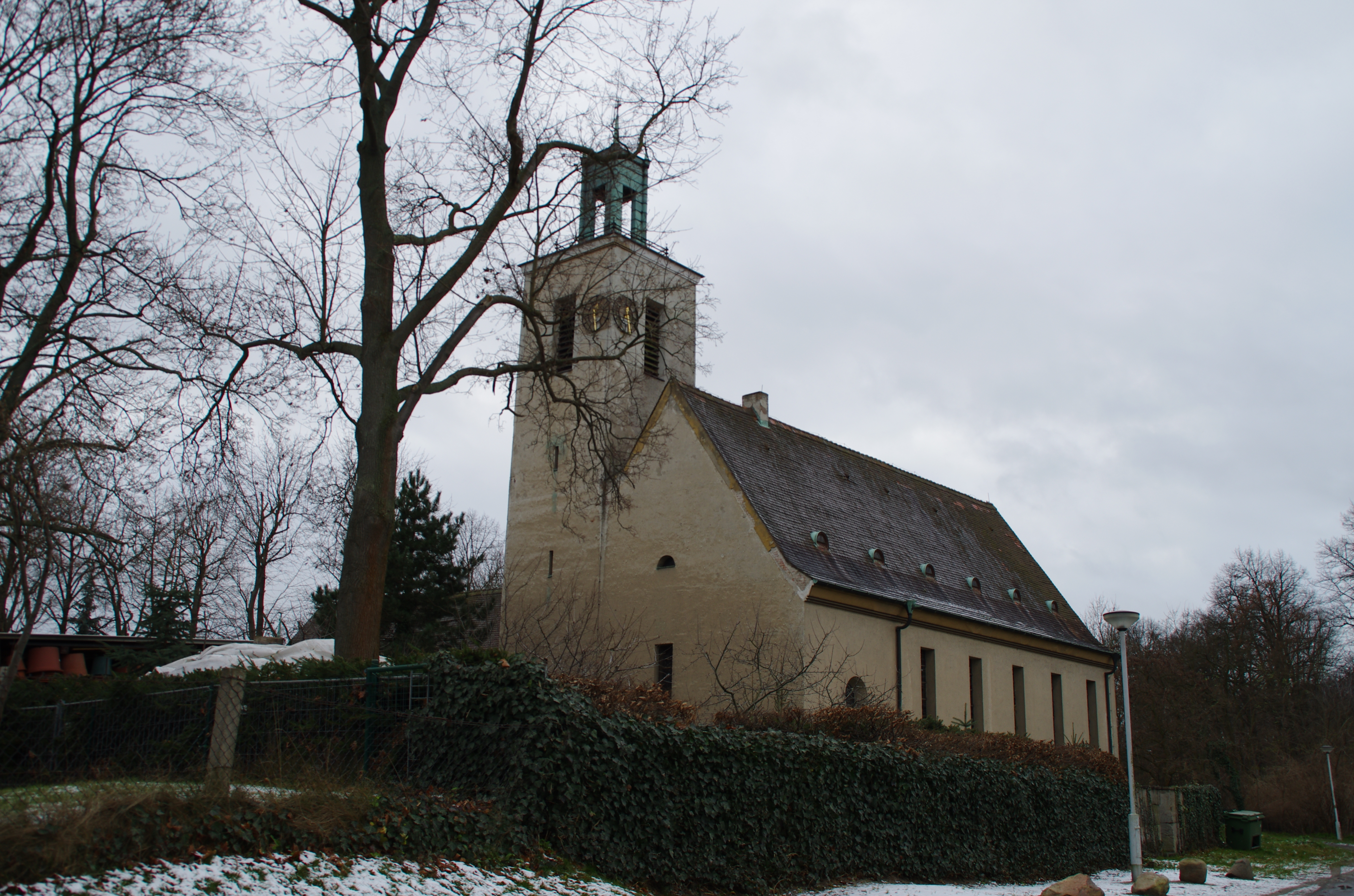 Brandenburg an der Havel Ortsteil Kirchmöser. DieKirche befindet sich im Ortsteil Kirchmöser West und ist ein Baudenkmal.